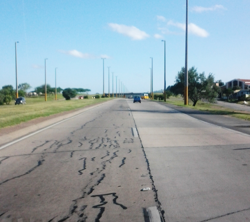 Ruta 5 próximo a Av Luis Batlle Berres, hacia el sur